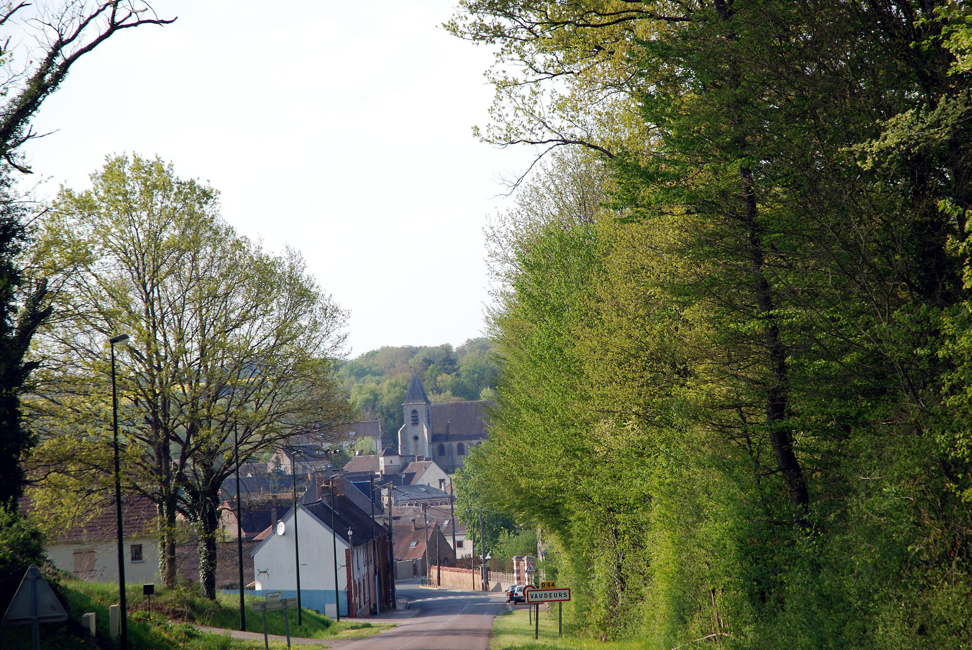 Entrée du village de Vaudeurs (Yonne France)